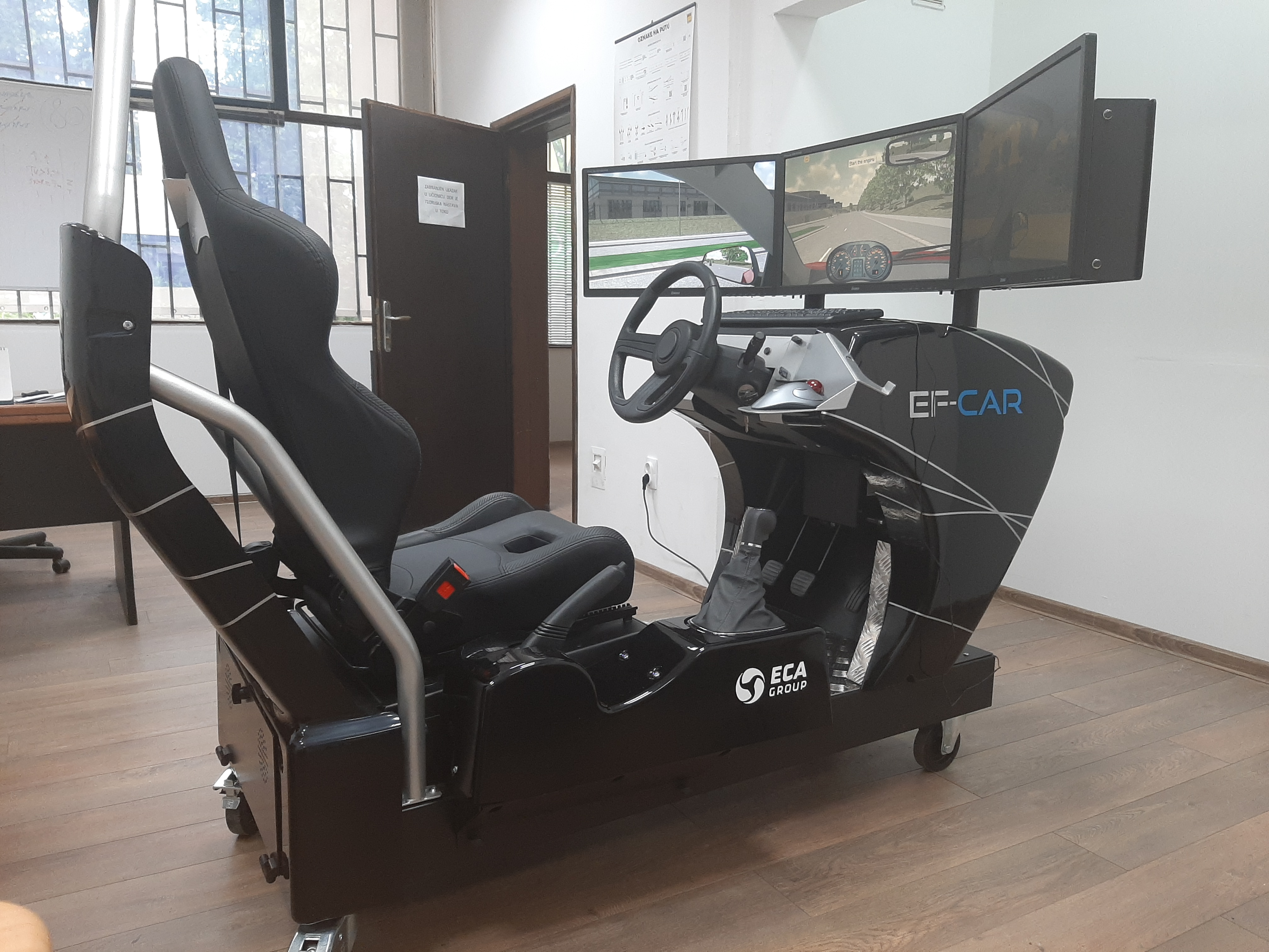 Virtuelna vožnja automobila